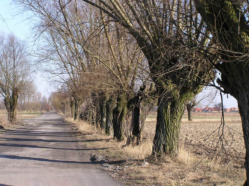 Łomianki, Kościelna Droga.